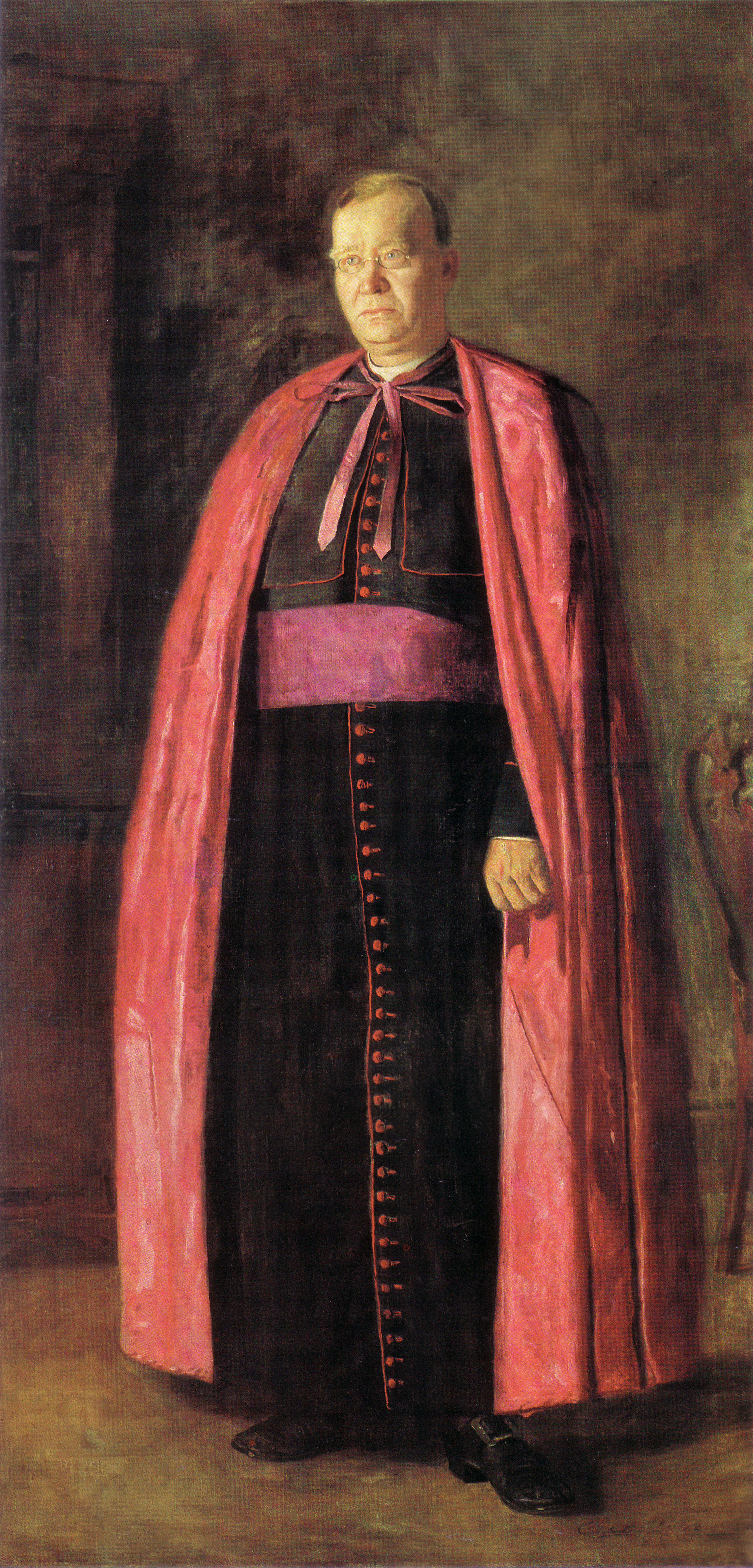 Mark Pellegrini